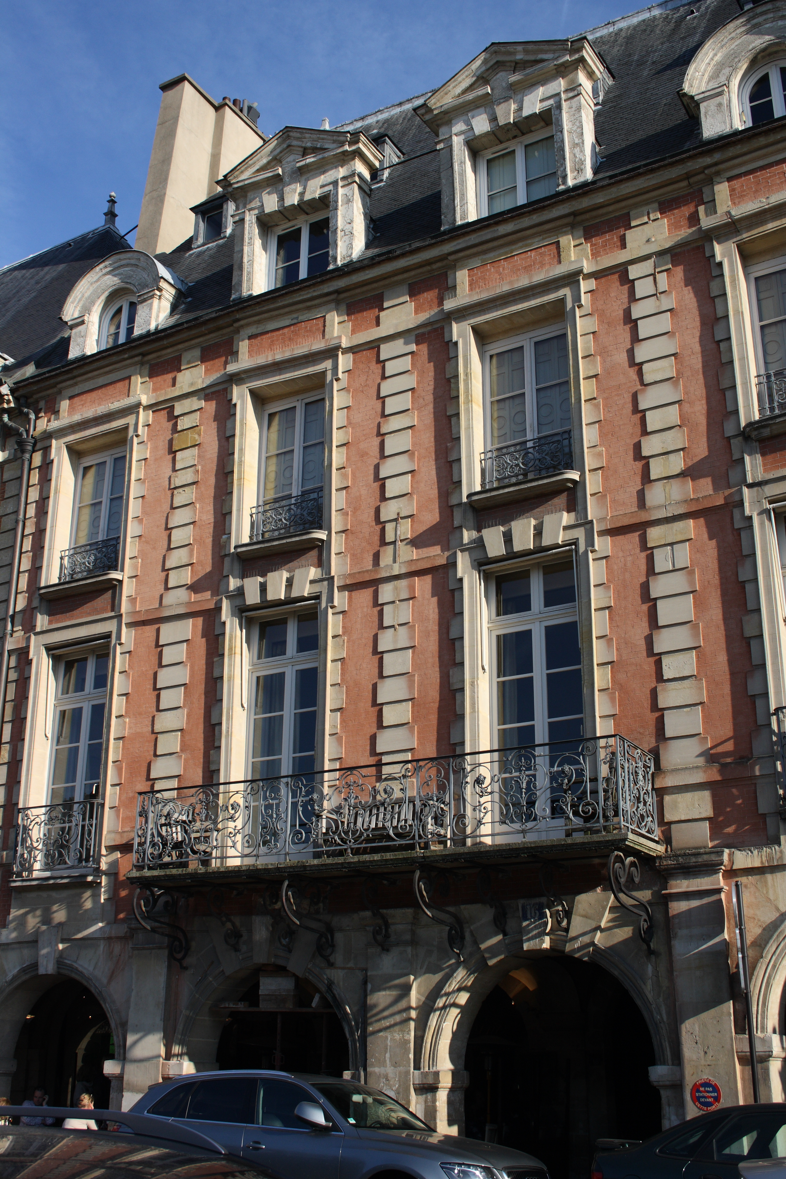 Hôtel d'Asfeldt in Paris, 16 place des Vosges